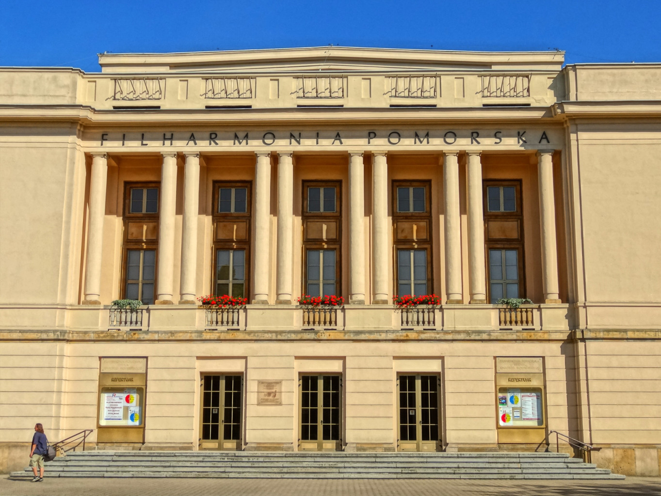 Budynek Filharmonii Pomorskiej im.Ignacego Jana Paderewskiego w Bydgoszczy zbud.w 1955 r.